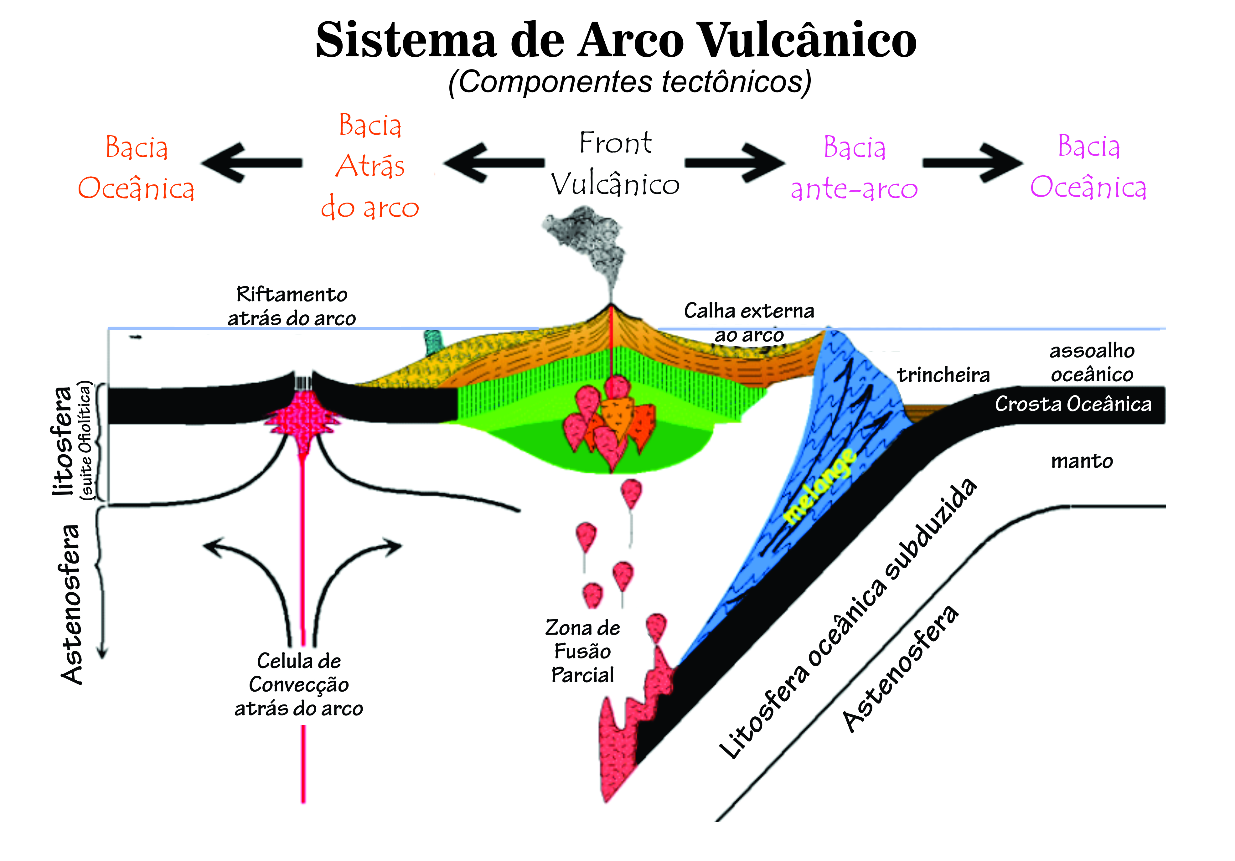 Arcos de ilha